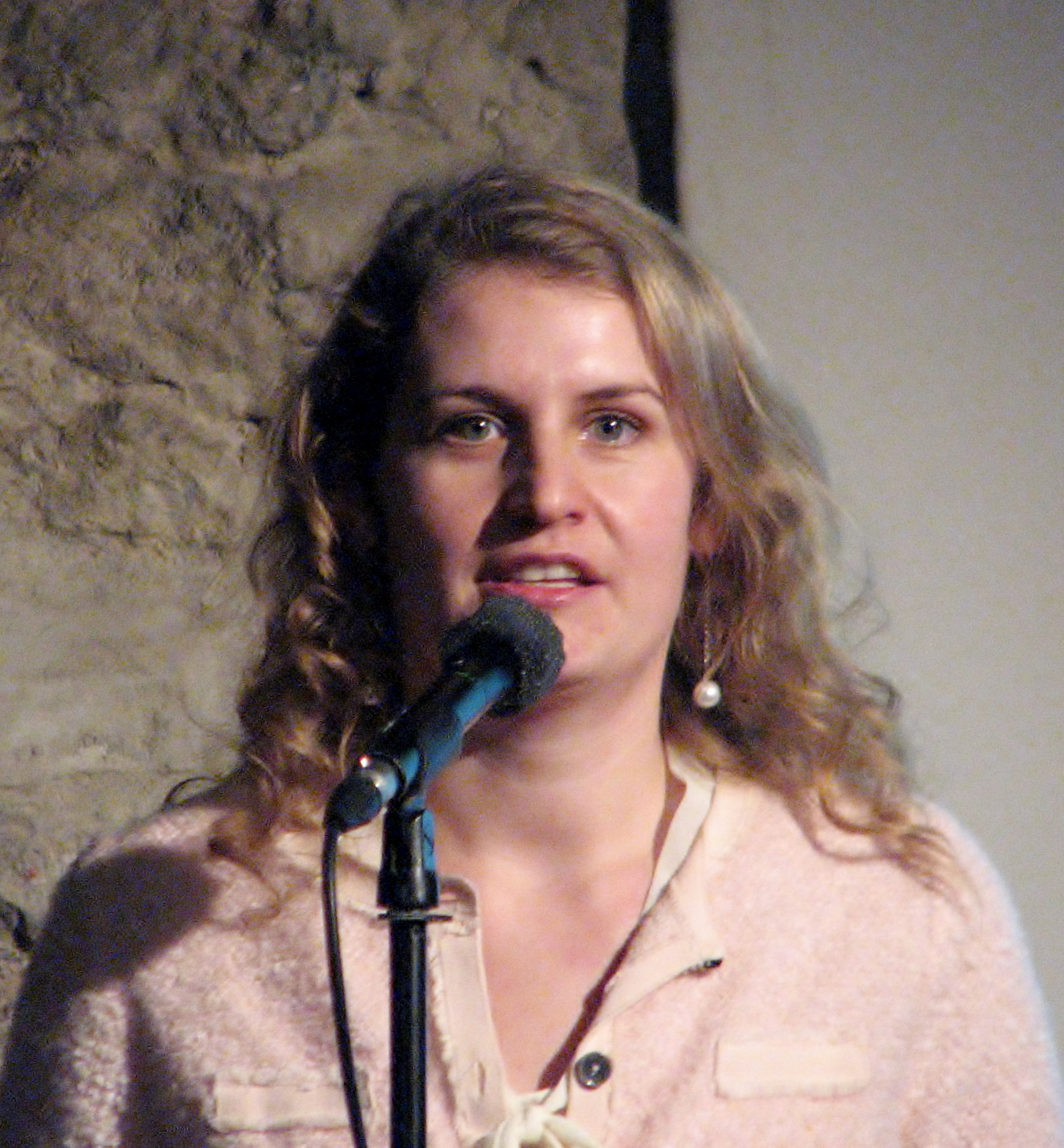 Mari Uusküla esinemas Vadja keele sõnaraamatu esitlusel Kloostri aidas